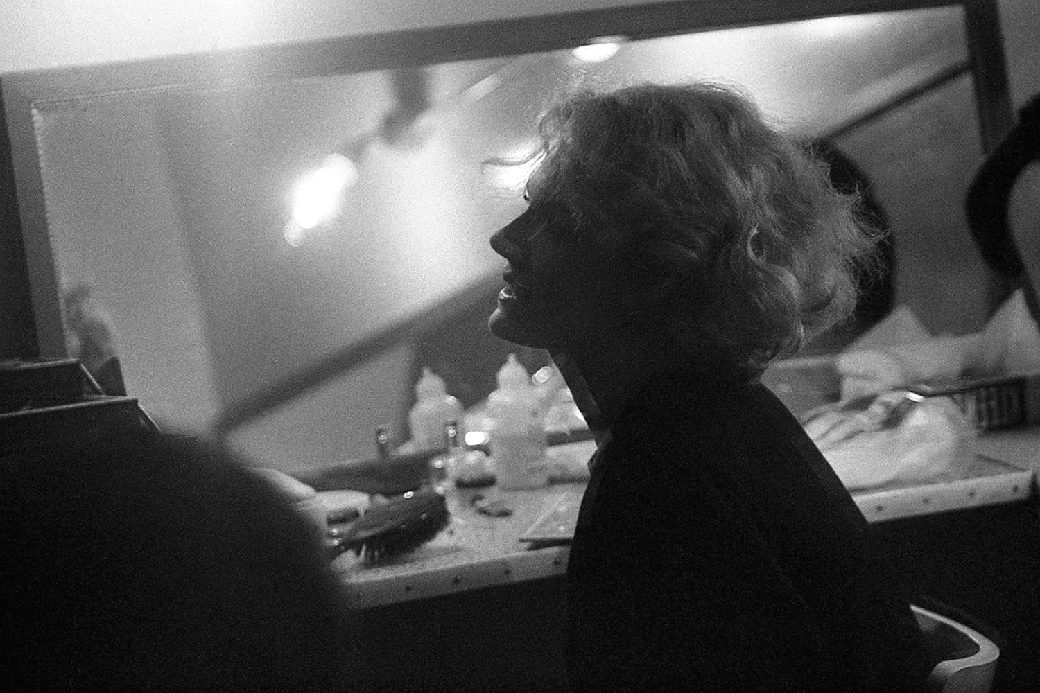 Delphine Seyrig dans sa loge en 1965